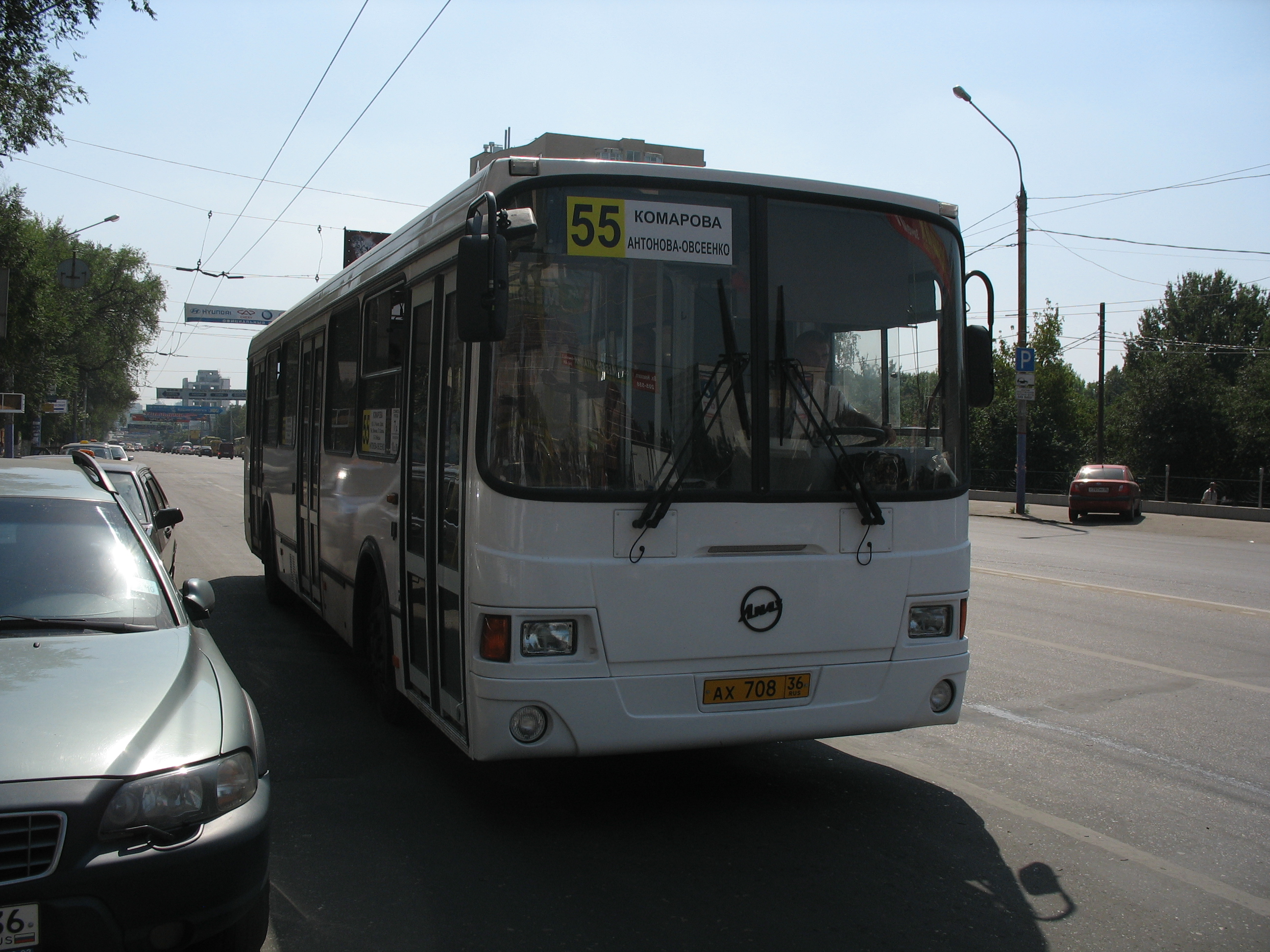 Новый ЛиАЗ-5256ю36 в Воронеже